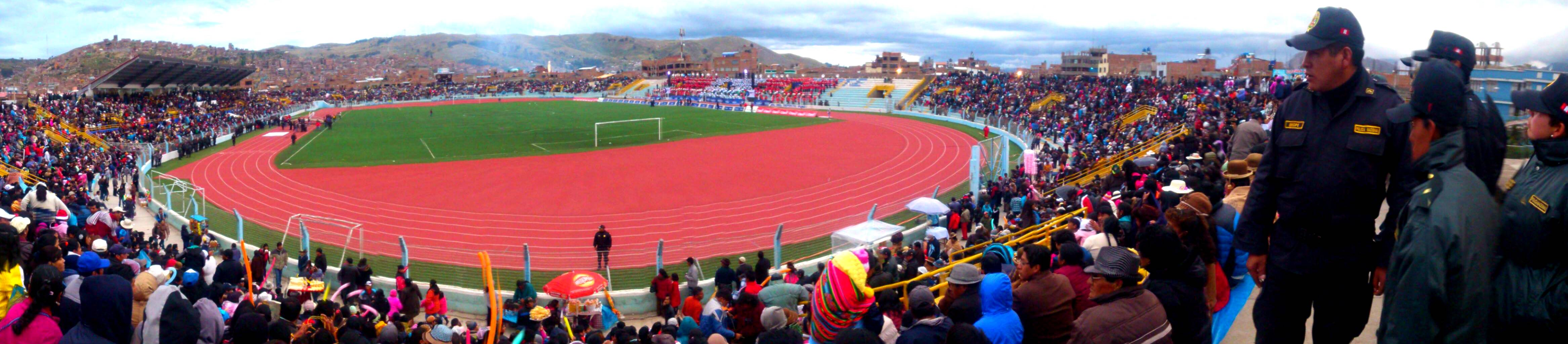 Candelaria 2014